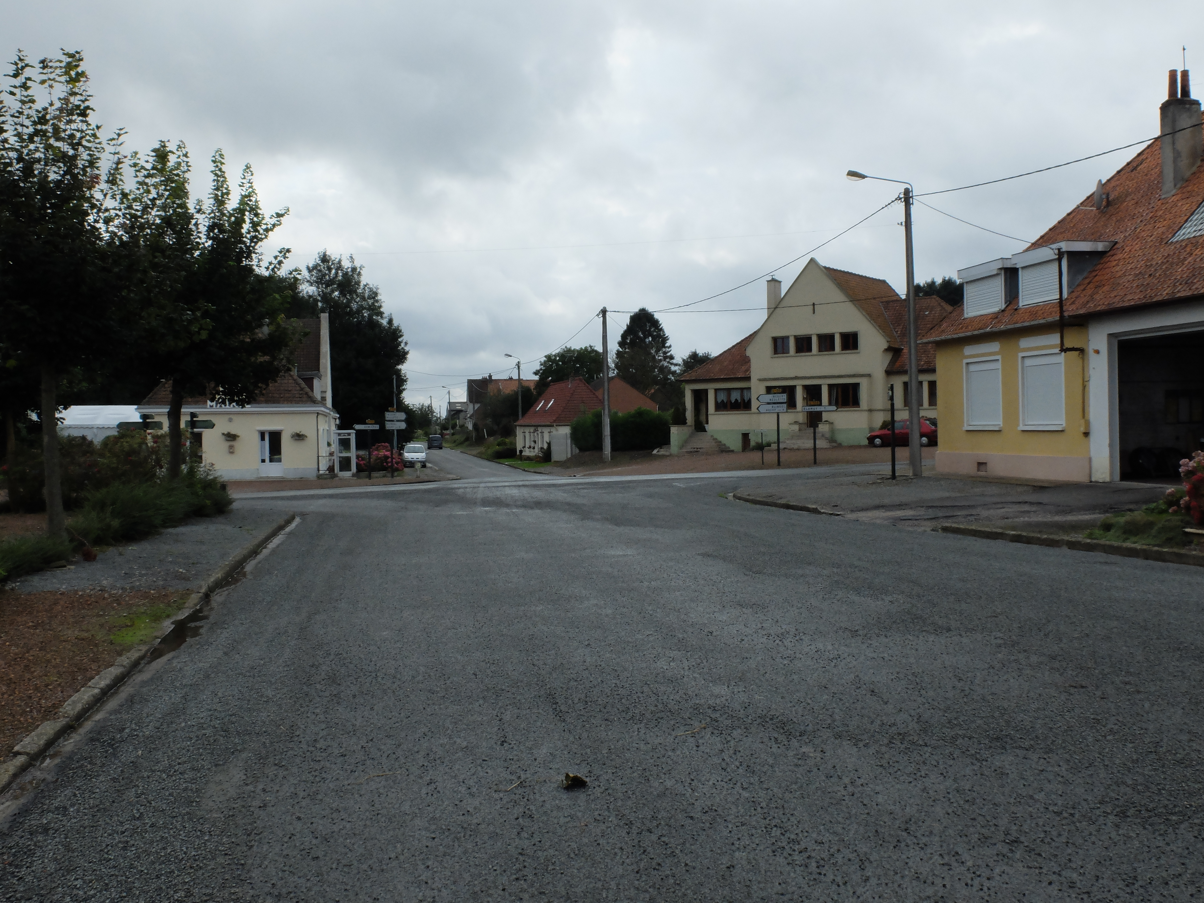 Vue d'Éclimeux depuis l'église Notre-Dame.